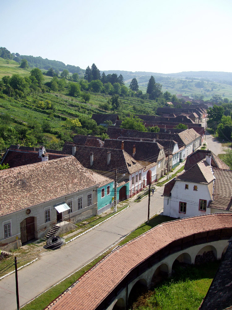 Ansicht von Wurmloch